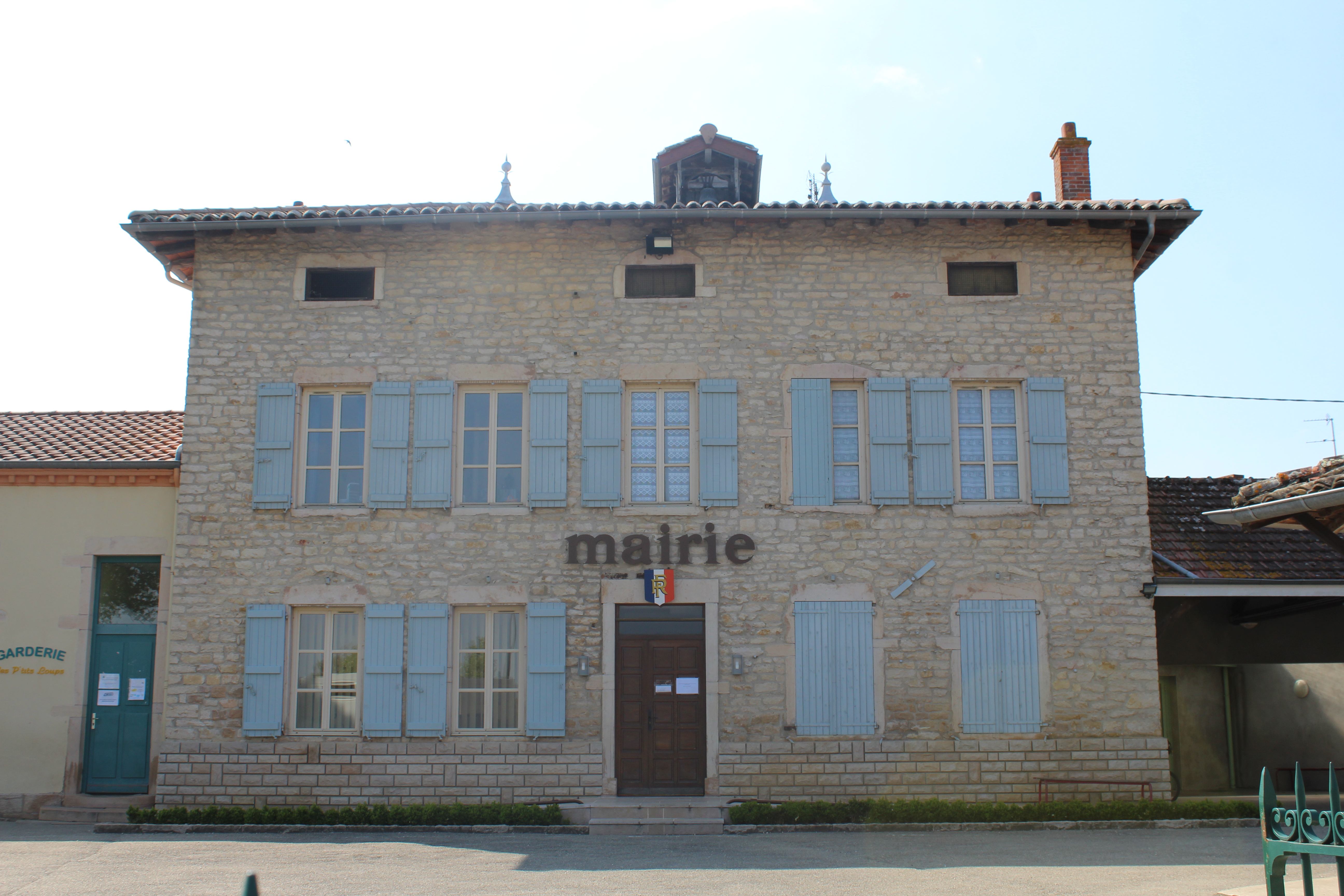 Mairie de Saint-Bénigne.